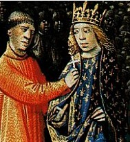 Louis VII prenant la croix pour la IIe Croisade